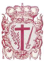 Selo utilizado pela Inquisição Portuguesa que simbolizava seu lema de justiça e misericórdia, sendo respectivamente representadas pela espada e pela oliveira.